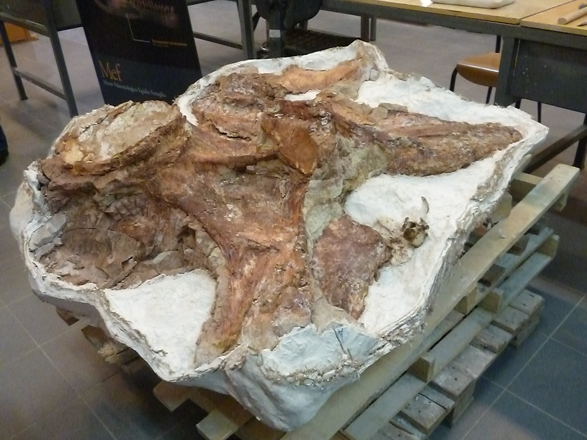 Fósiles del titanosauria del Chubut en el Museo Egidio Feruglio de Trelew, Chubut, Argentina. Descubiertos en 2013 y presentados en 2014, supuestamente se trata del animal terrestre más grande de la historia de la Tierra. Pesaría 4 toneladas más que el Argentinosaurus y su fémur mide más de dos metros.